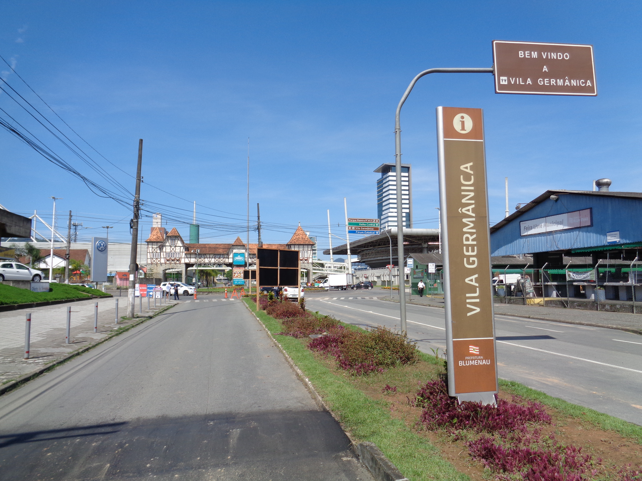 Inscrições e pórtico na entrada da Vila Germânica, em Blumenau